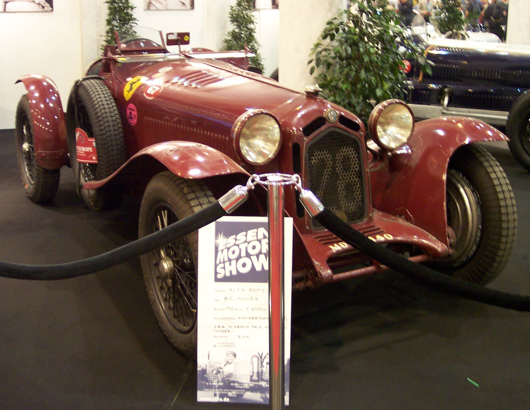 Source: Eigenes Bild